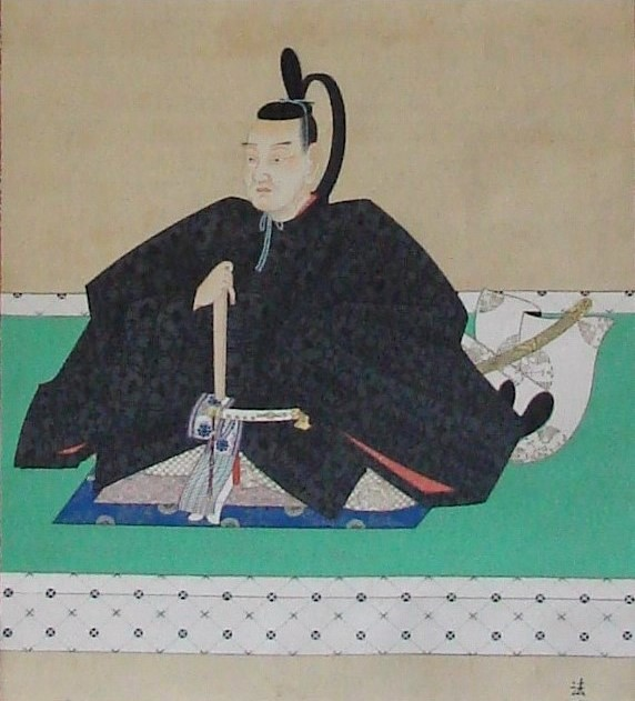 相馬恕胤の肖像。